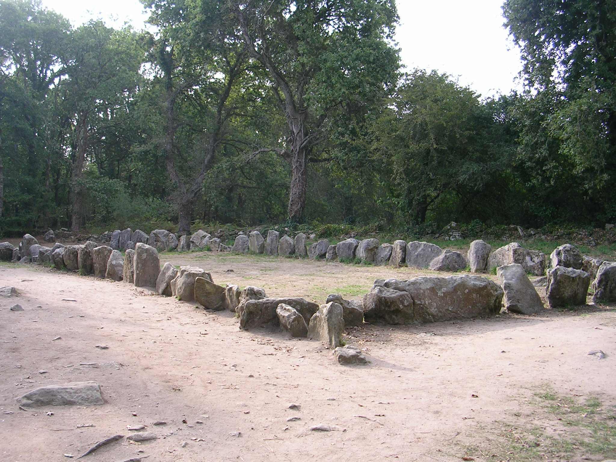 Tumulus, quadrilatère et menhir de Manio .